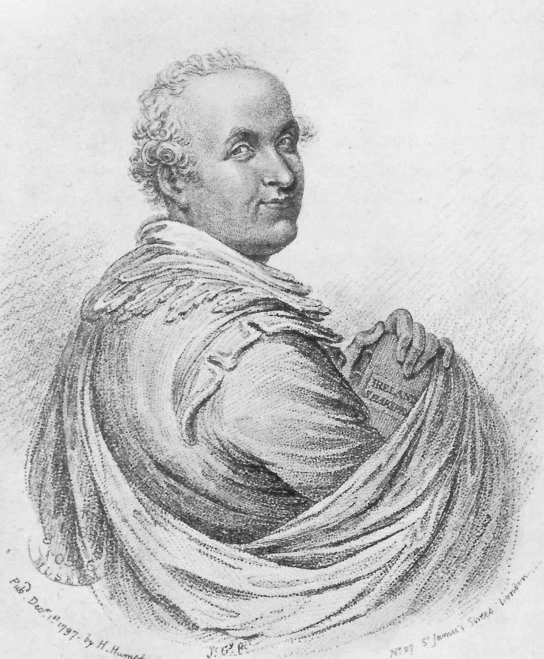 Caricature de Samuel Ireland.